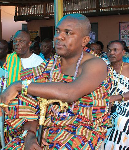 Togbe Abutia Kodzo Gidi V